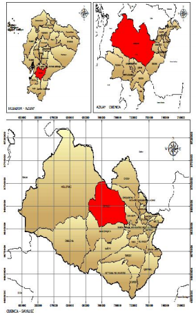 Ubicación Geográfica Parroquia Sayausí